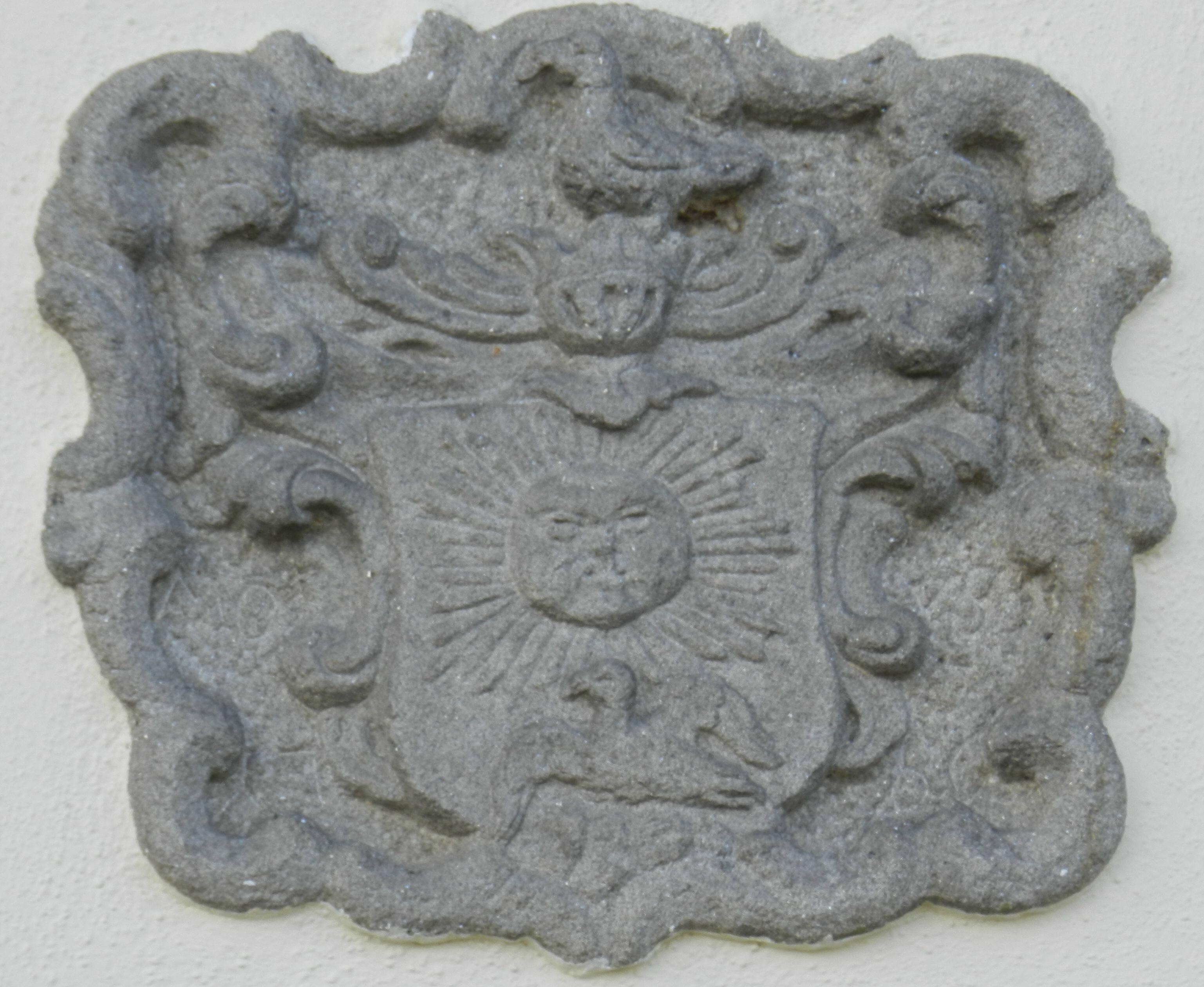 Wappen derer von Sazenhofen (Satzenhofen)-Sonnenburg in Ödmiesbach, Gemeinde Teunz, Landkreis Schwandorf, Oberpfalz, Bayern (2011)